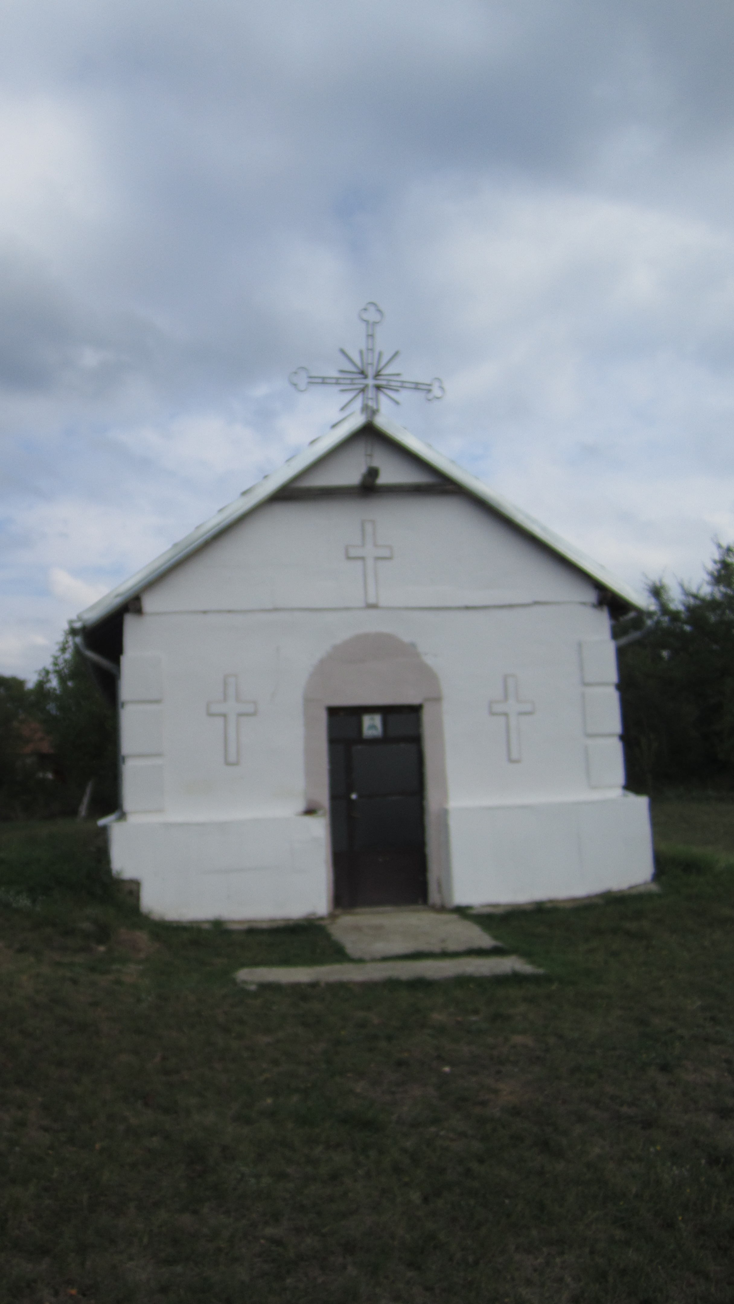 Srpski (latinica): Razgojna, Leskovac